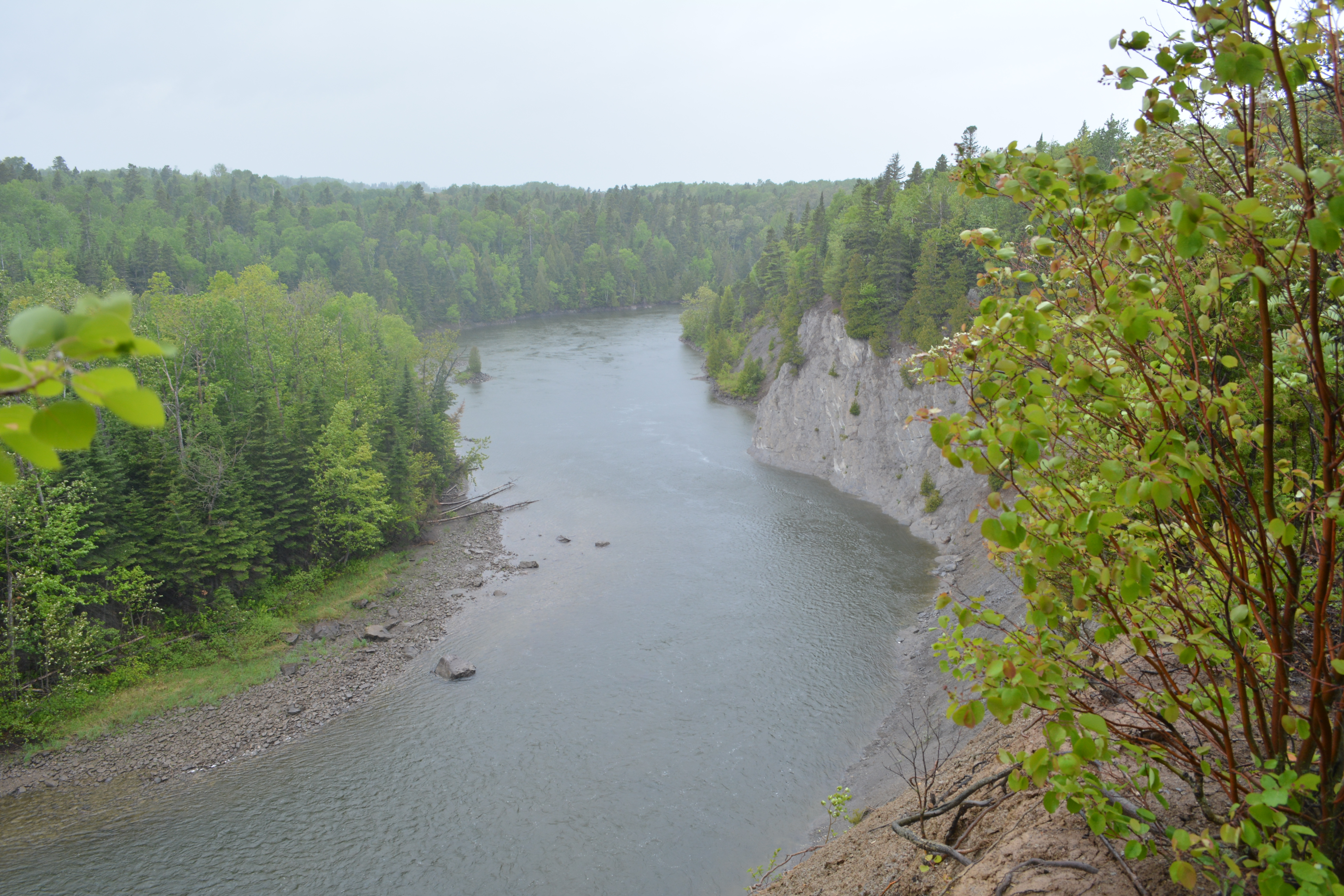 Rivière Mitis vue à partir du sentier Mitiwee près de la municipalité de Price